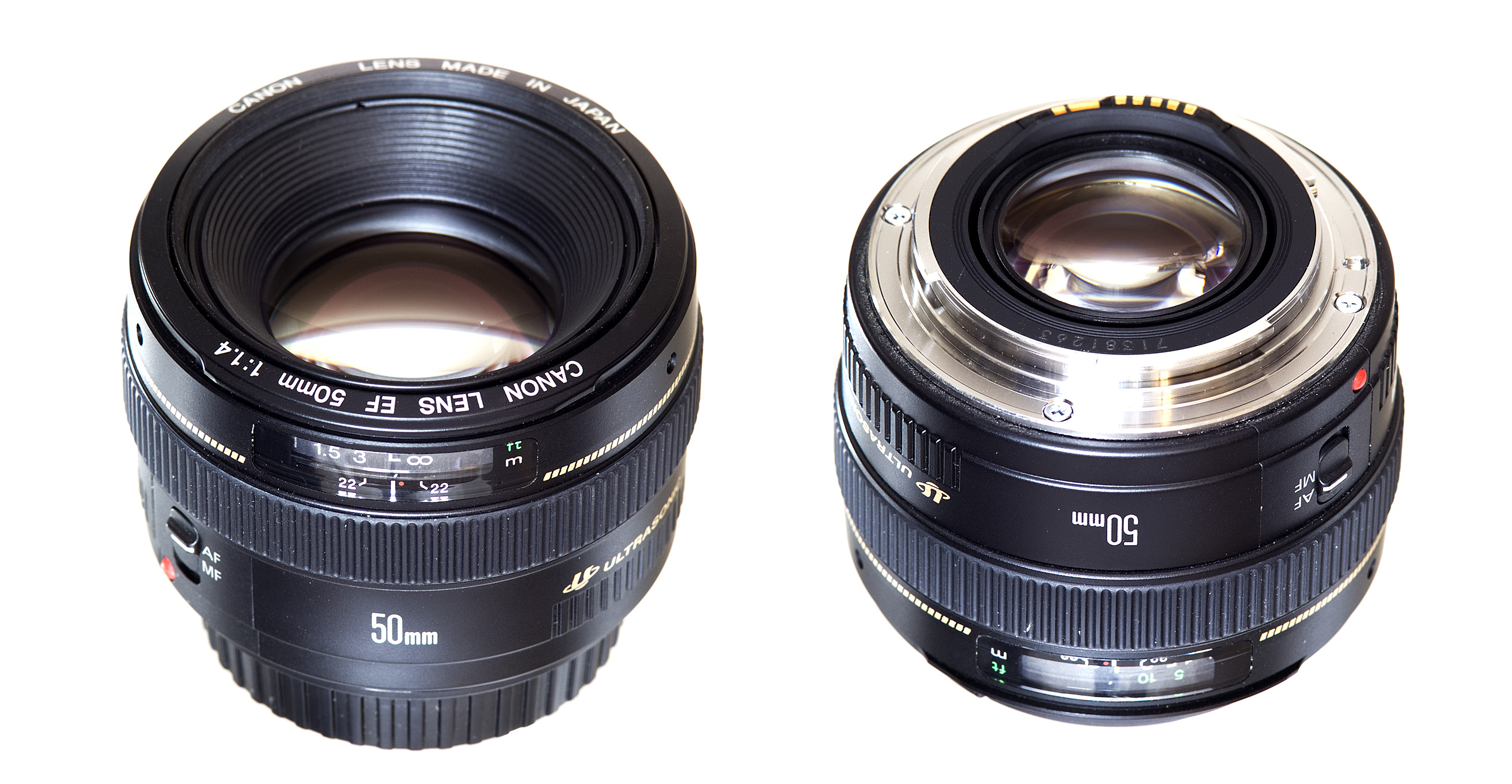 A Canon EF 50mm f/1.4 autofocus lens.